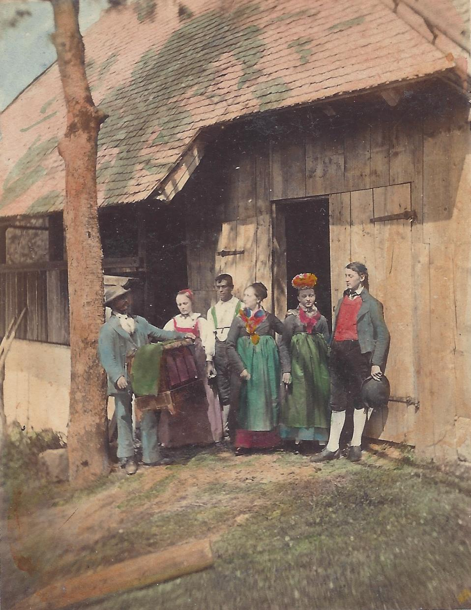 Ludovico Wolfgang Hart, getintete Fotographie N° 77, aus der Galerie universelle des Peuples: Schappbacher Tracht, 1864